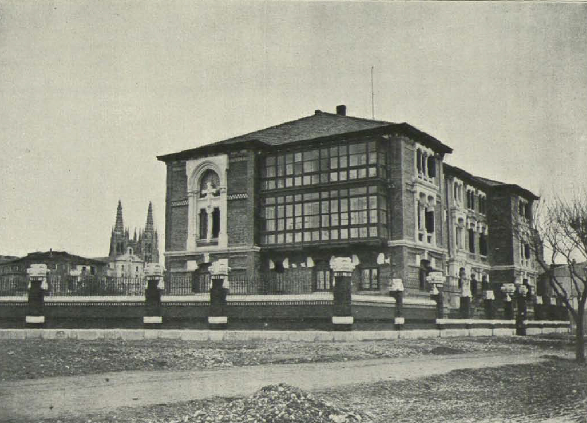 Colegio para Niñas, de Religiosas Francesas del Niño Jesús, Burgos, fachada lateral.